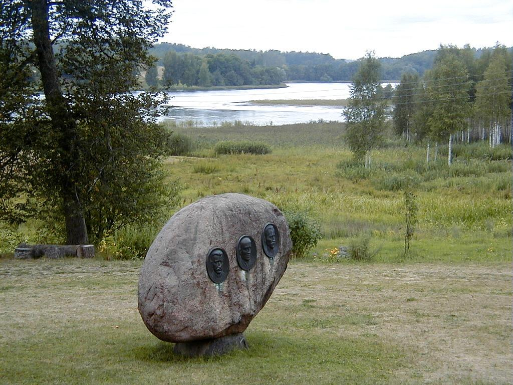 Ērgļu apkārtne, brāļu Jurjānu piemiņas akmens 1999-08-16